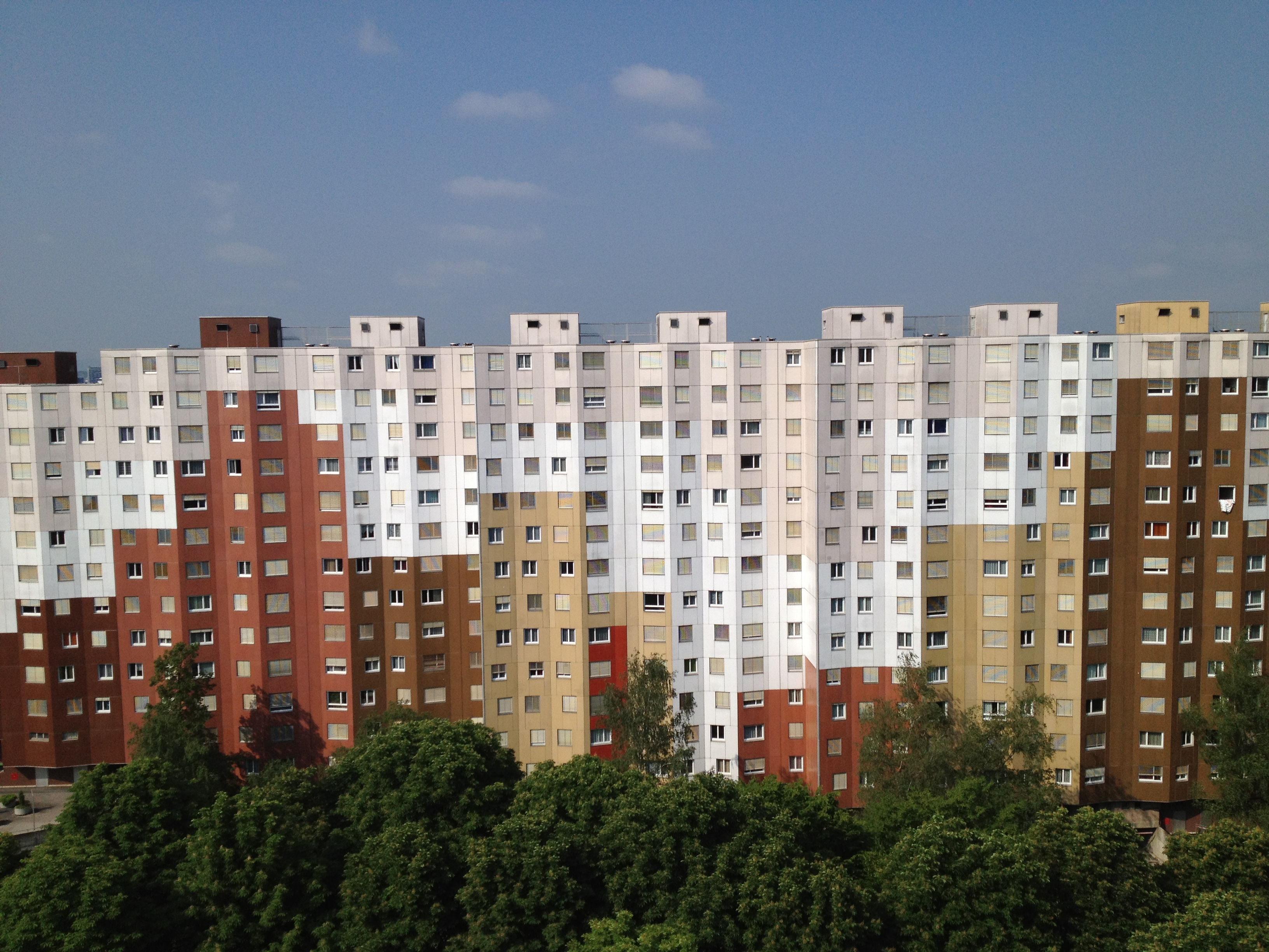 Cité des Avanchets, Genève, Suisse